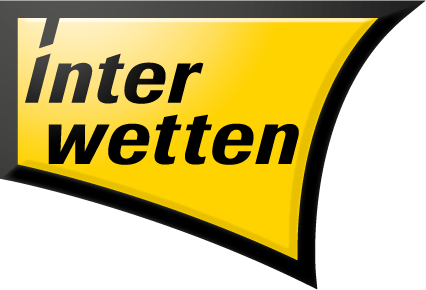 Das Logo von Interwetten.